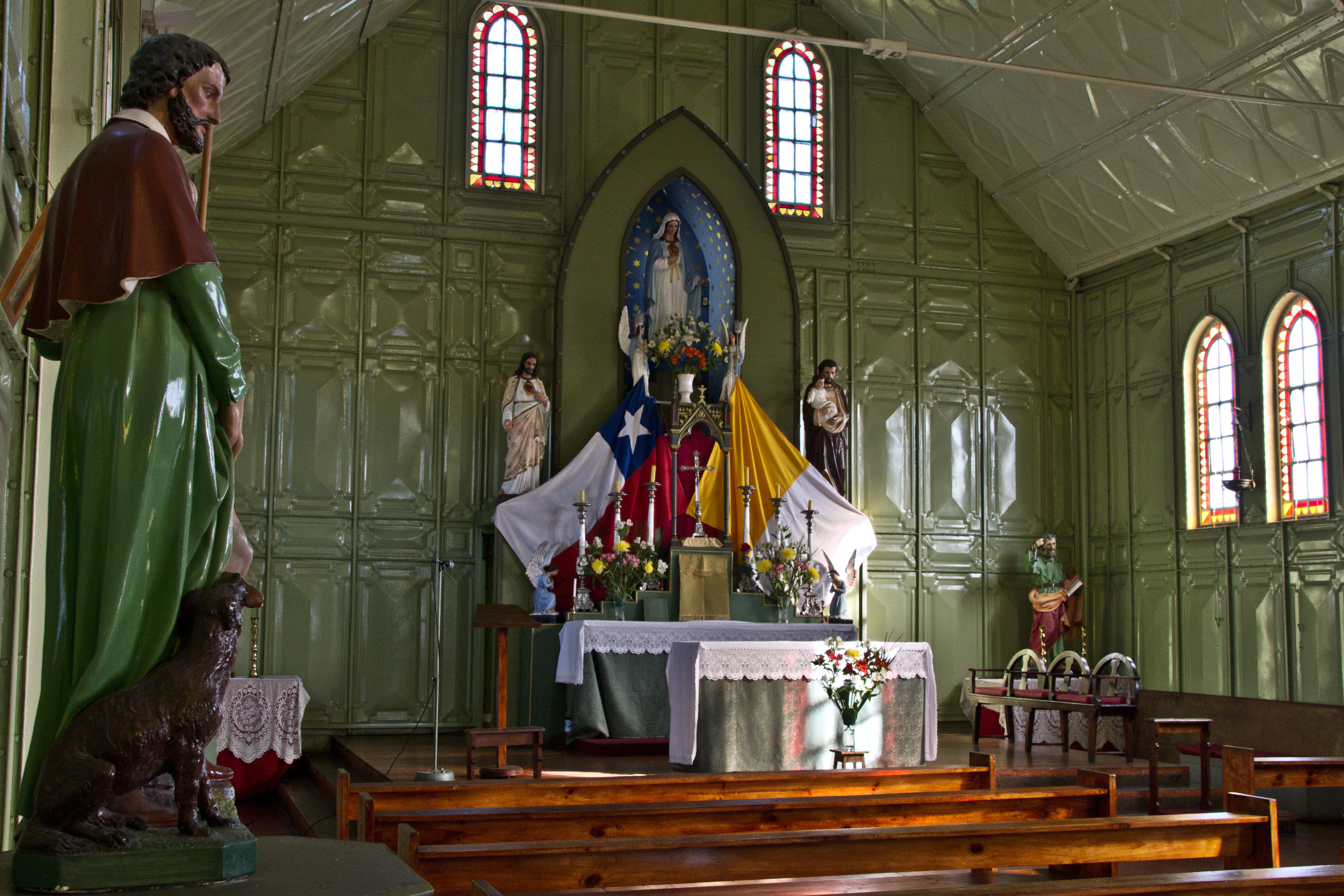 Iglesia de Guayacán This is a photo of a national monument in Chile: 350